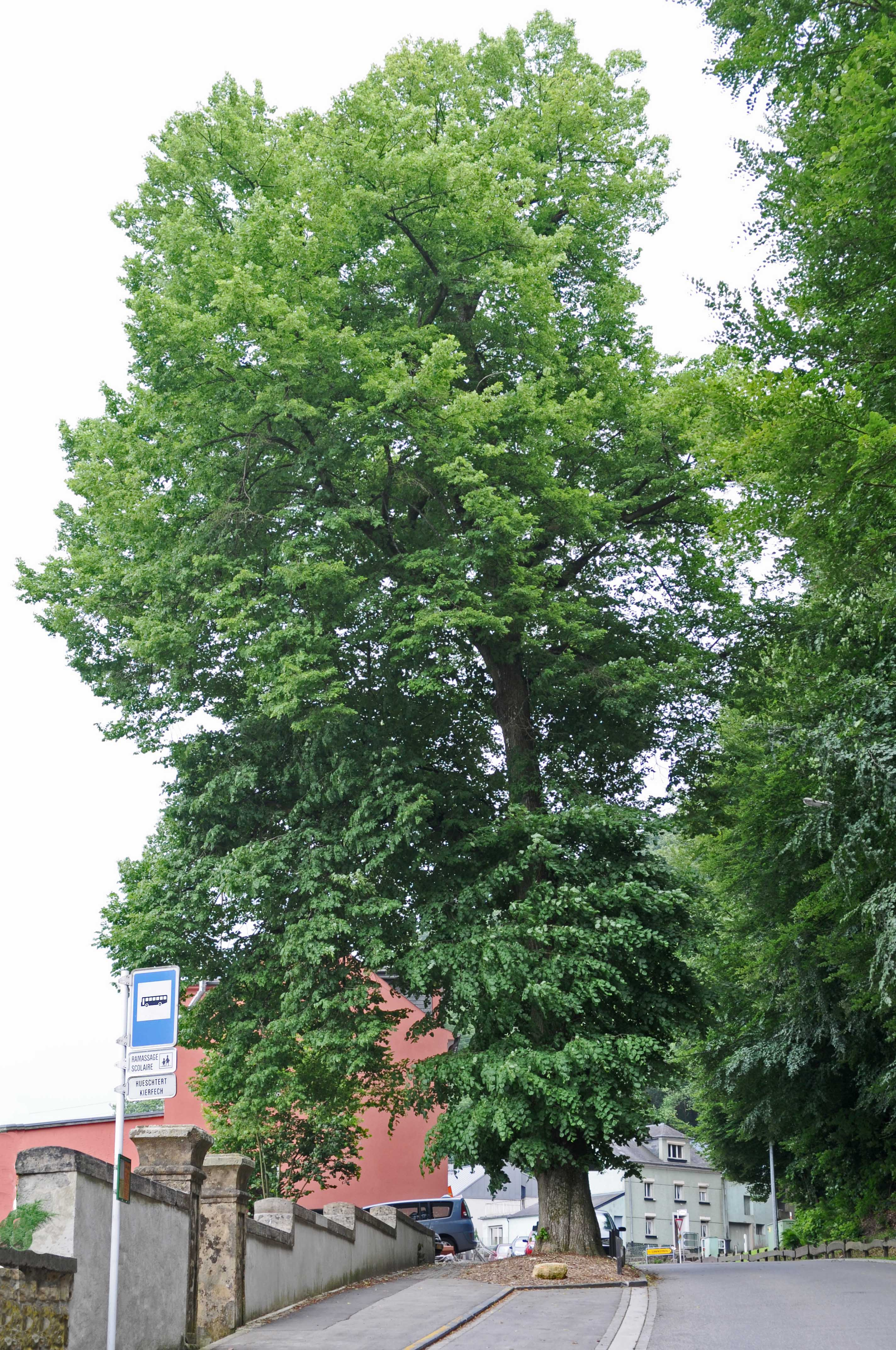 Lann zu Hueschtert (Nidderaanwen).